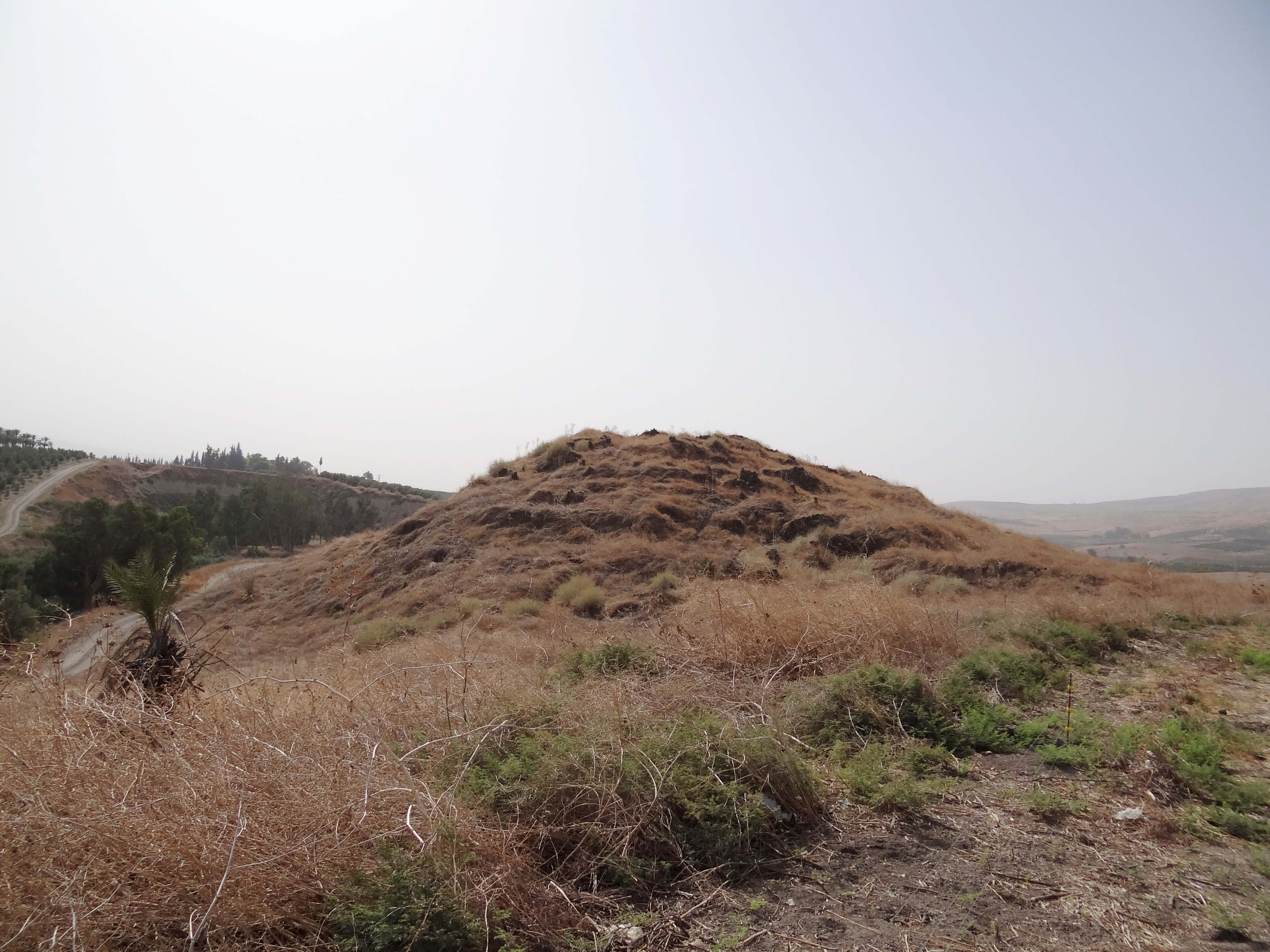 Tel Ubeidiya 3 km south of Lake Tiberias, in the Jordan Rift Valley, Israel, is an archaeological site of the Pleistocene תל עובדיה הוא תל בין המושבה מנחמיה לקיבוץ בית זרע, אשר בקרבתו אתר פרהיסטורי הנחשב לאחד האתרים הקדומים ביותר בעולם ובעל חשיבות רבה בקנה מידה עולמי להבנת האבולוציה של האדם.